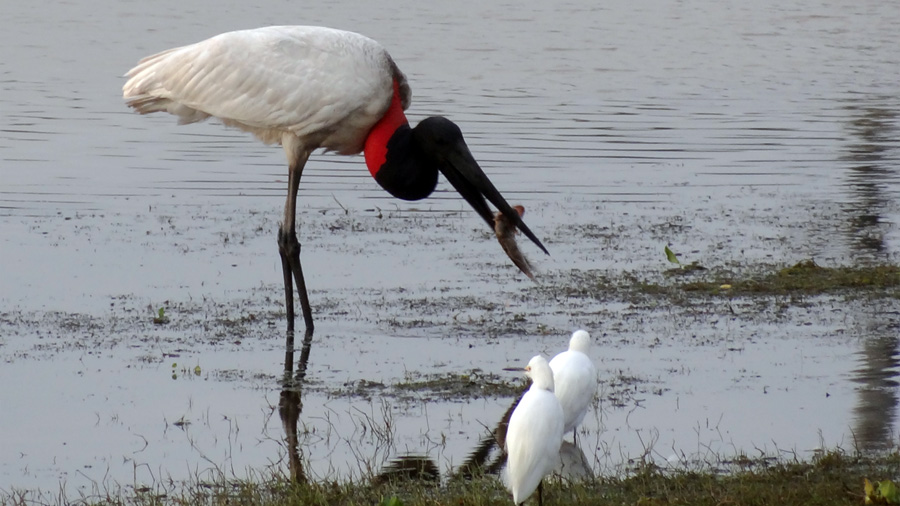 Jabiru en el Bañado la Estrella, Formosa, Argentina.